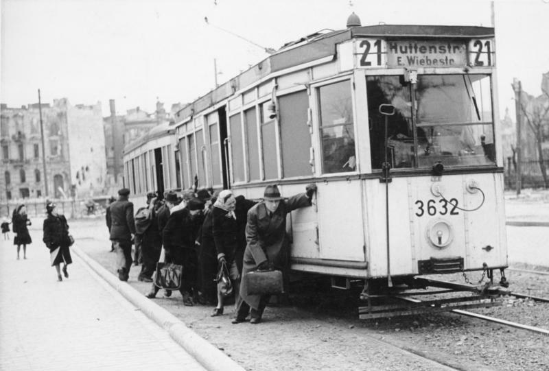 Berlin, Straßenbahn ohne Strom Illus/ Erich O. Krueger Berlin 1946, Berliner Strassenbahn Die stromlose Strassenbahn wird von den Fahrgästen 50m weitergeschoben, damit sie wieder in den Strombereich kommt. [Fahrgäste schieben Straßenbahn der Linie 21 (Nr. 3632) Richtung "Huttenstr. E. Wiebestr."]